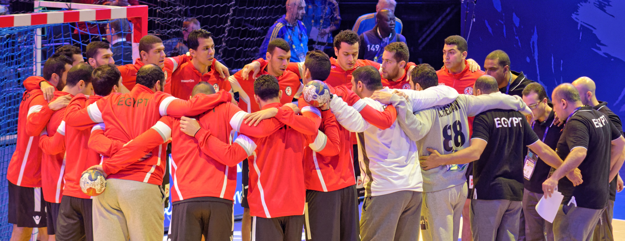 Match de la phase préliminaire du championnat du monde masculin de handball 2017 entre l'Egypte et le Danemark (Groupe D). A Bercy, le 14 janvier 2017.